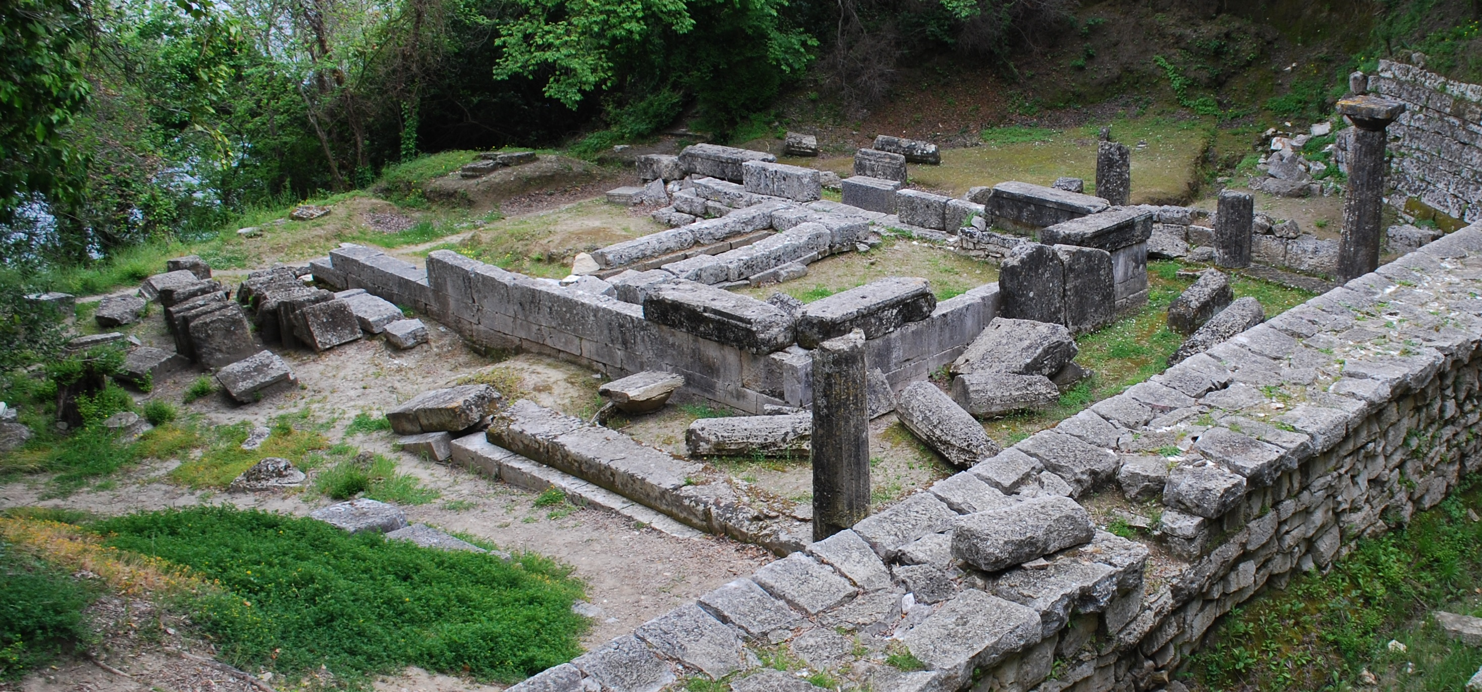 Vue du site archéologique de Paleopoli à Corfou.